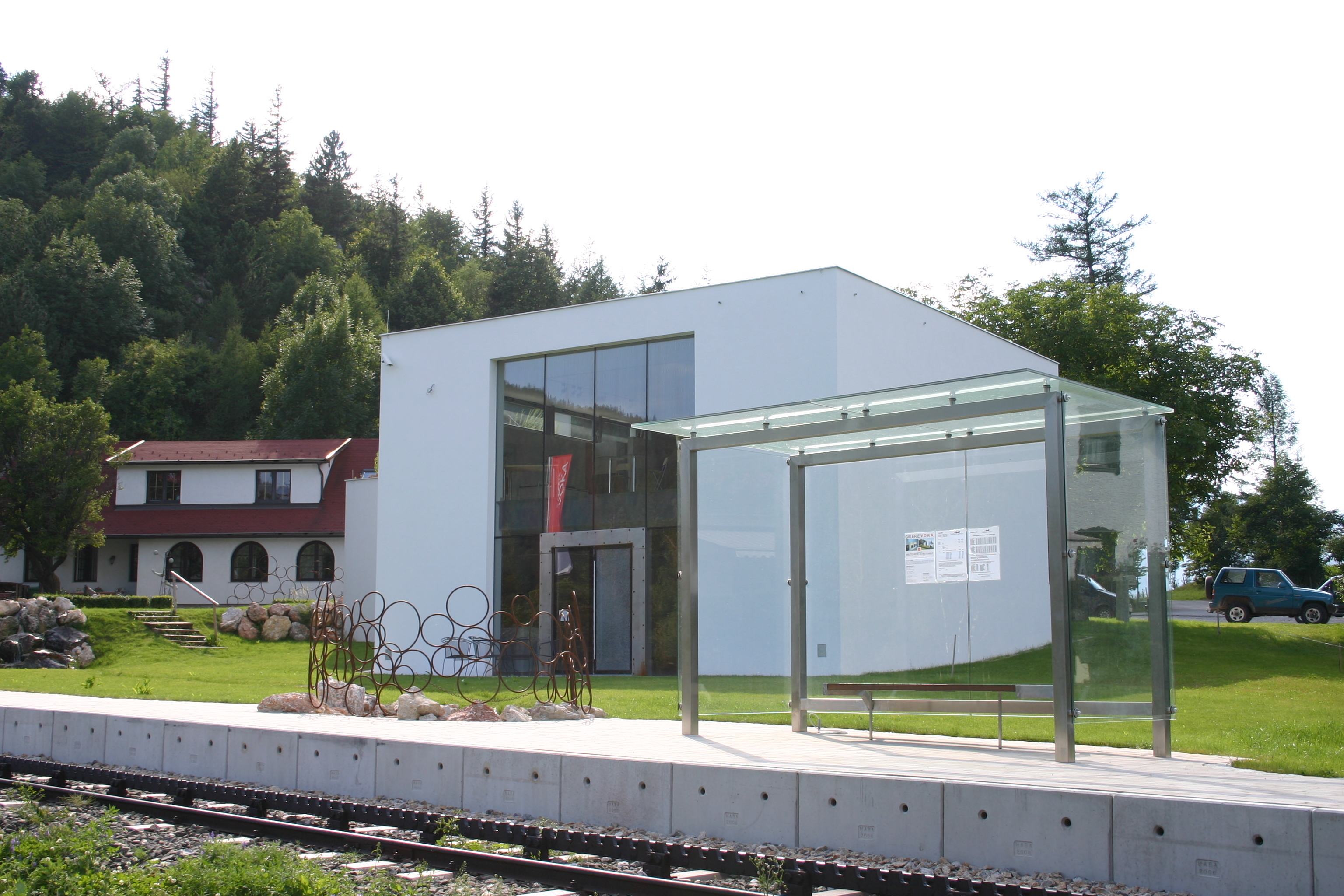 Puchberg am Schneeberg Zahnradbahn-Haltestelle Hengsttal mit Voka-Galerie